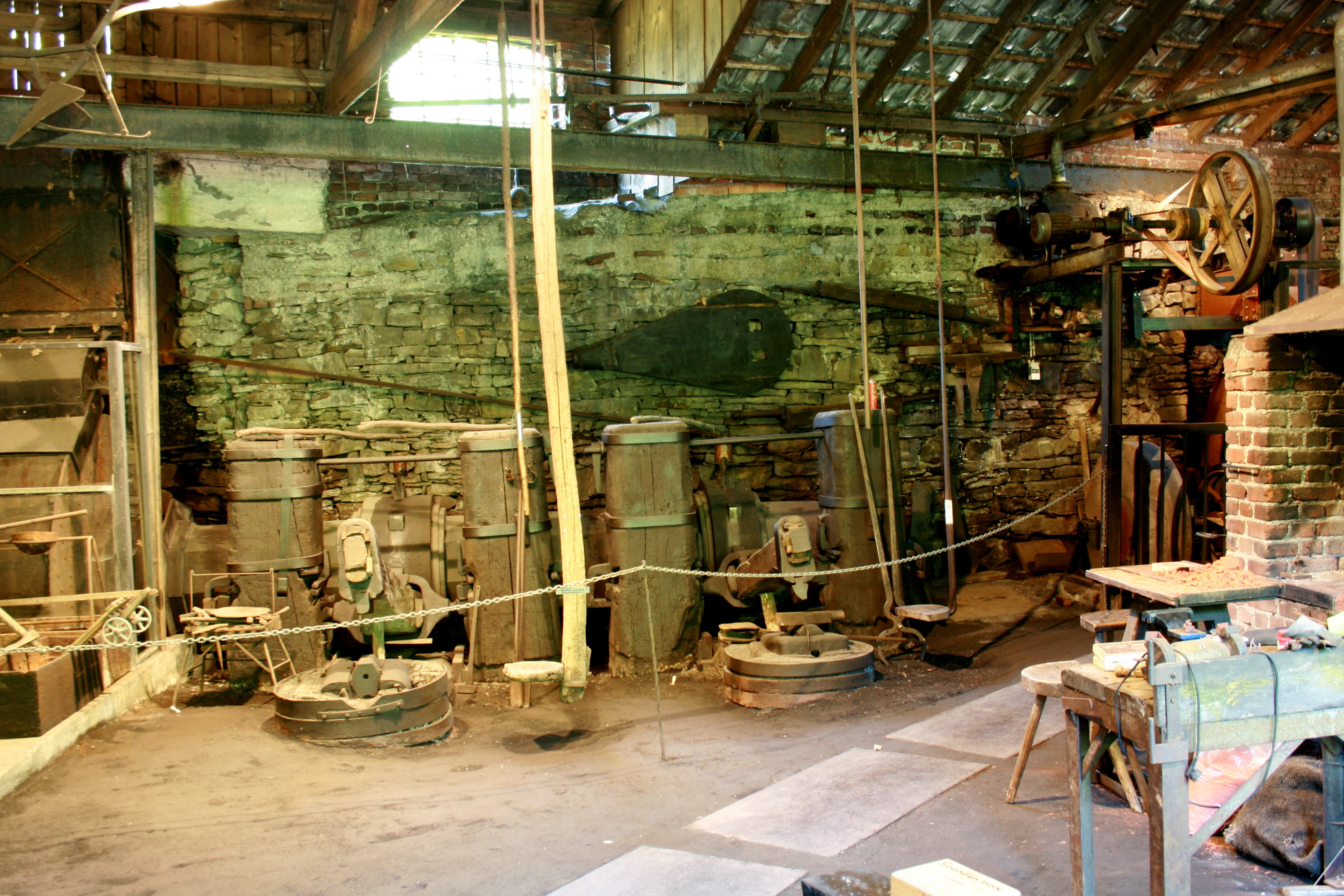 Bremecker Hammer in Lüdenscheid